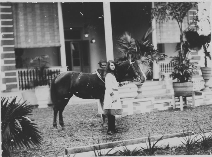 Foto. Jongedame met paard poseert voor woning in Poerwokerto (Java). Achter het paard staat de bediende die de jongedame helpt. Tante Anne van Tricht van Zuylen met paard en bediende in de tuin Poerwokerto 1915 Marseppa. Tante Anne Louise van Tricht - Van Zuylen